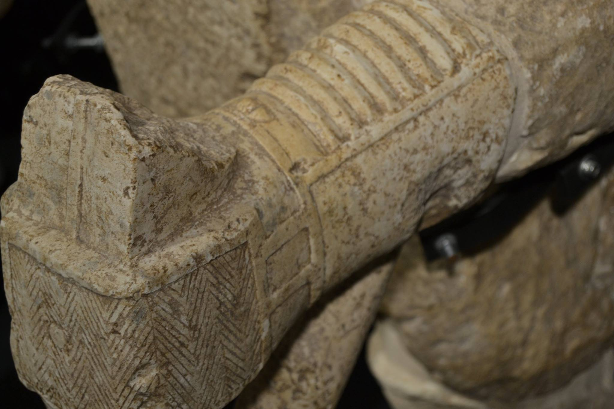 Braccio di arciere N.5, con guantone scolpito con lo scalpello e forse un regolo